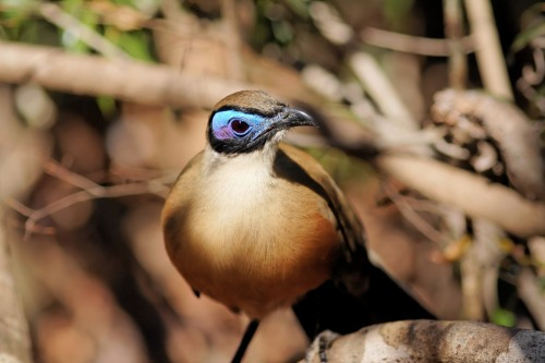 Giant Coua Coua gigas, Ampataka, Madagascar